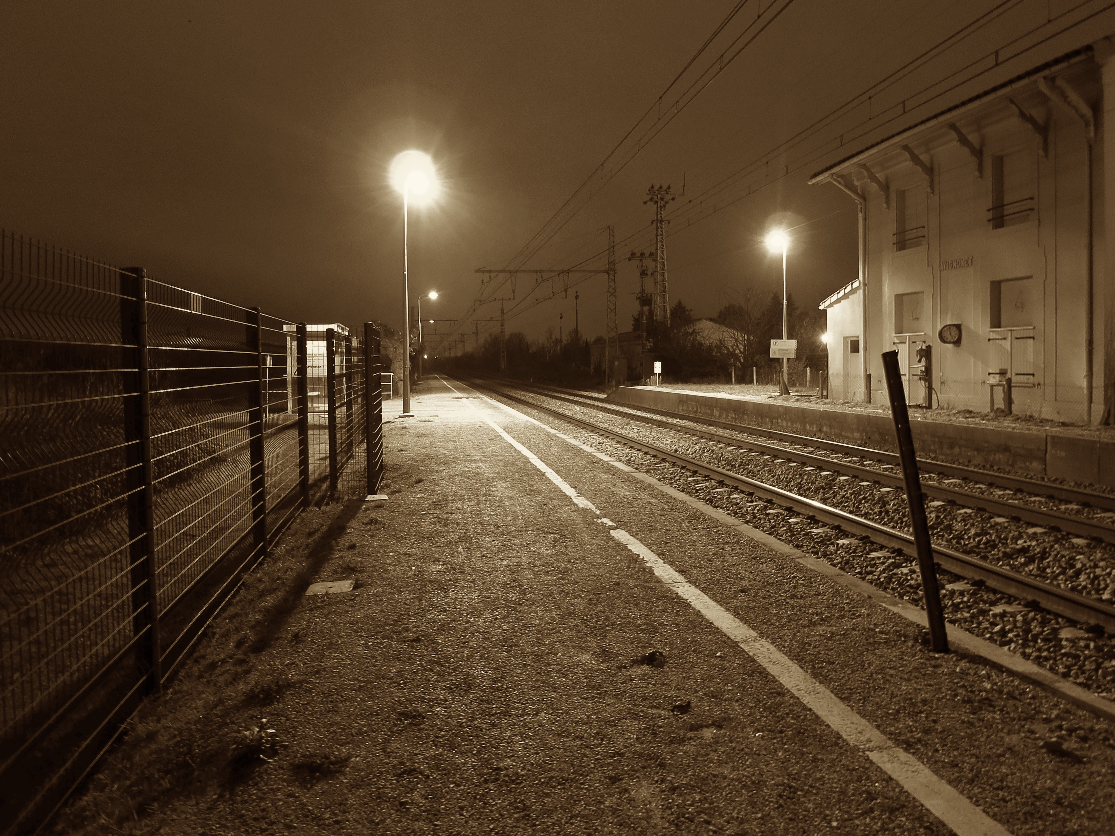 Avignonet-Lauragais (Haute-Garonne, France) : Gare d'Avignonet.